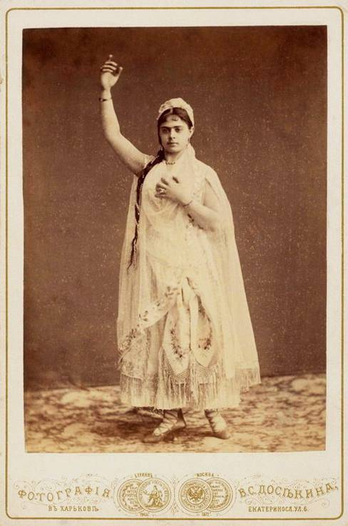 Е. П. Кадмина (1853—1881)